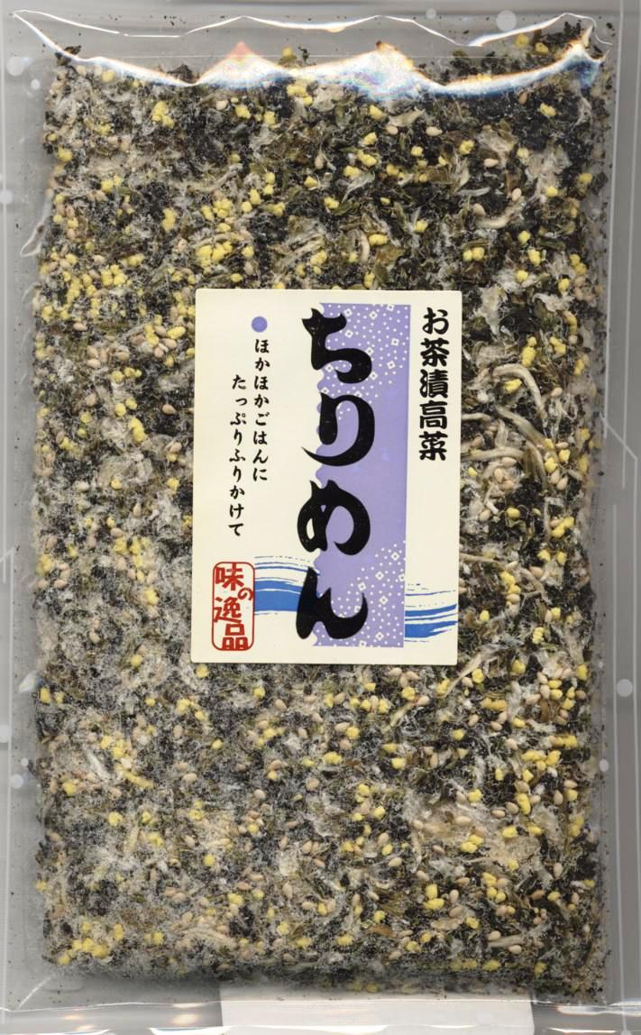 Image saisie au scanner Sachet de furikake artisanal. Auteur ruizo